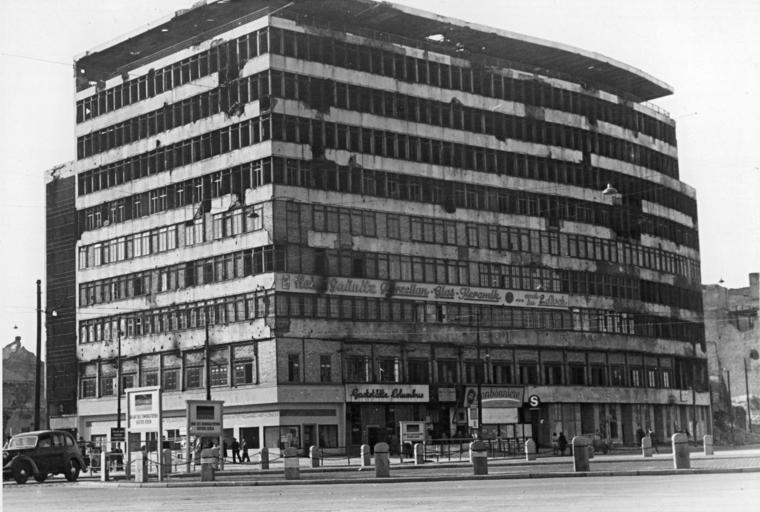 Berlin, Potsdamer Platz, "Columbushaus", Ruine UBz: Das Columbushaus am Potsdamer Platz in Berlin. Aufn.: Illus Funck S 97910 14.6.50 do Information added by Wikimedia users.